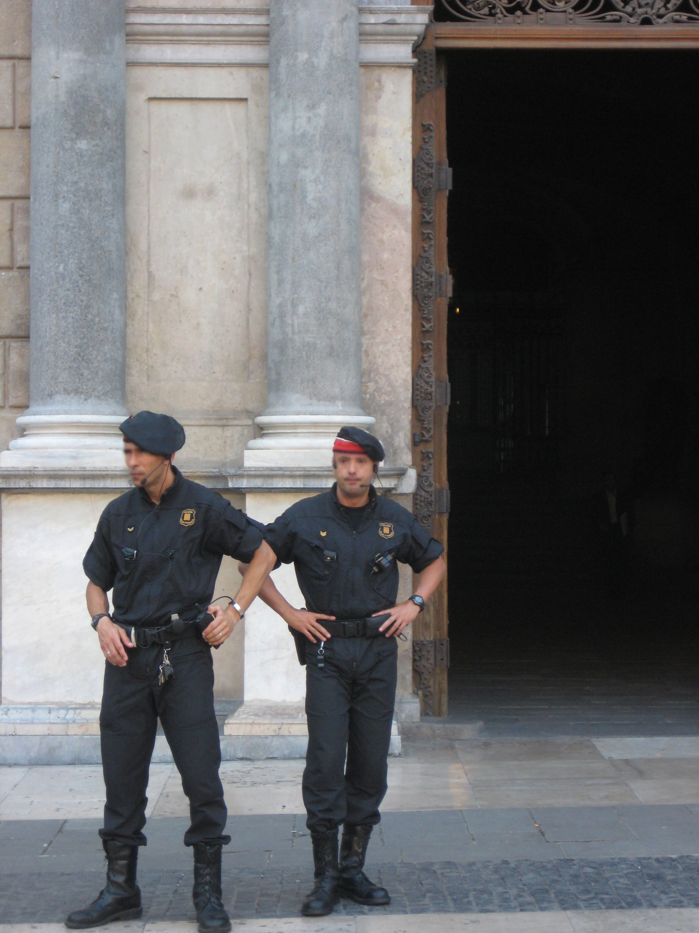 Mossos d'Esquadra al Palau de la Generalitat